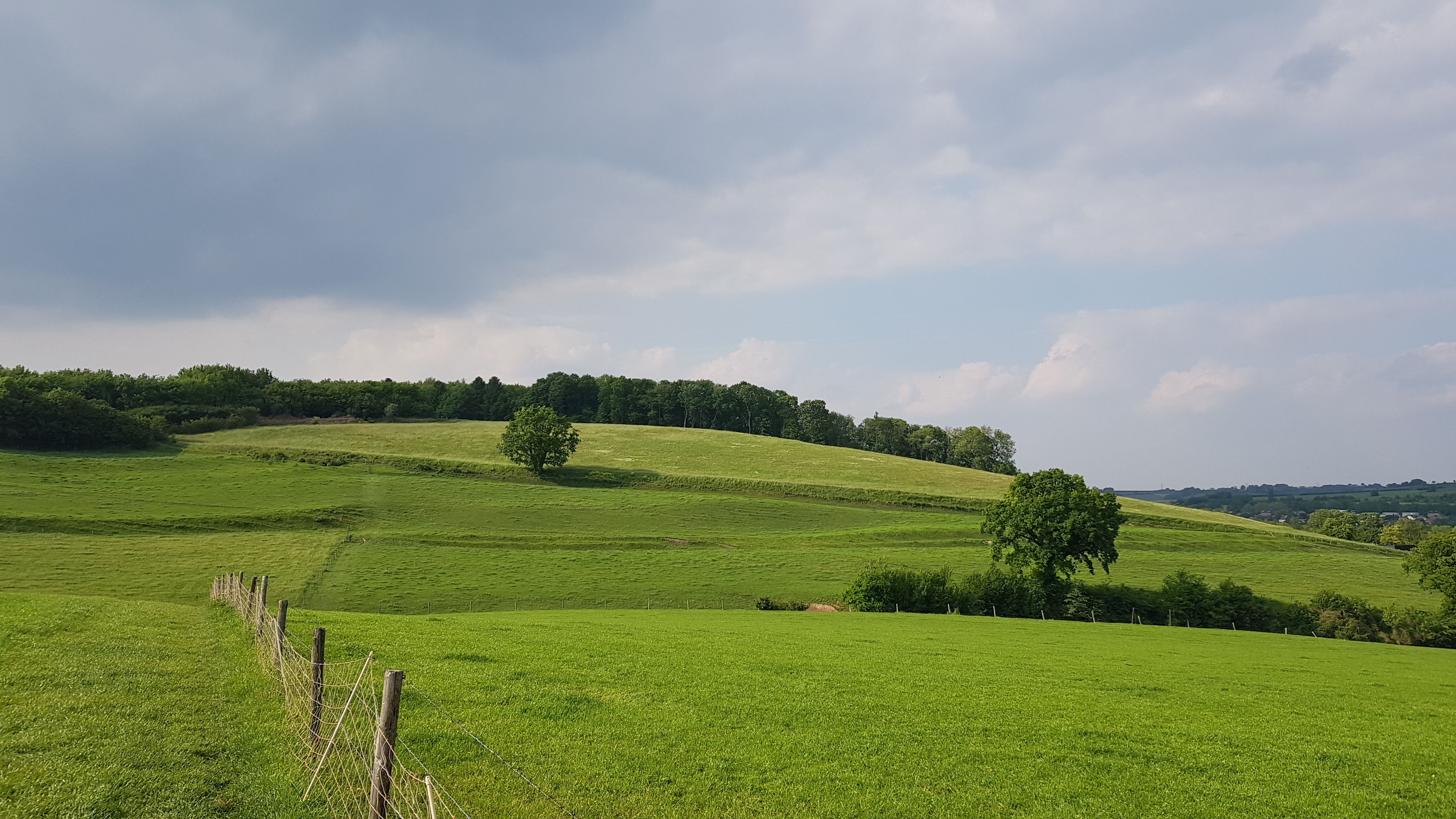 Dolsberg bij Gulpen, Nederland